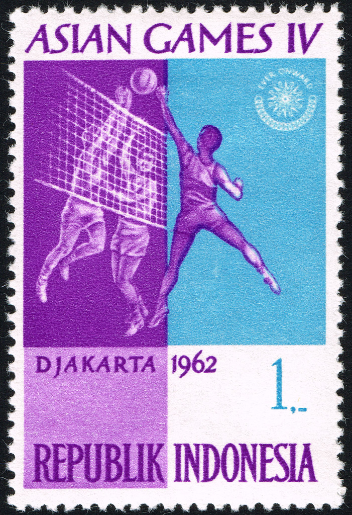 Asian Games IV